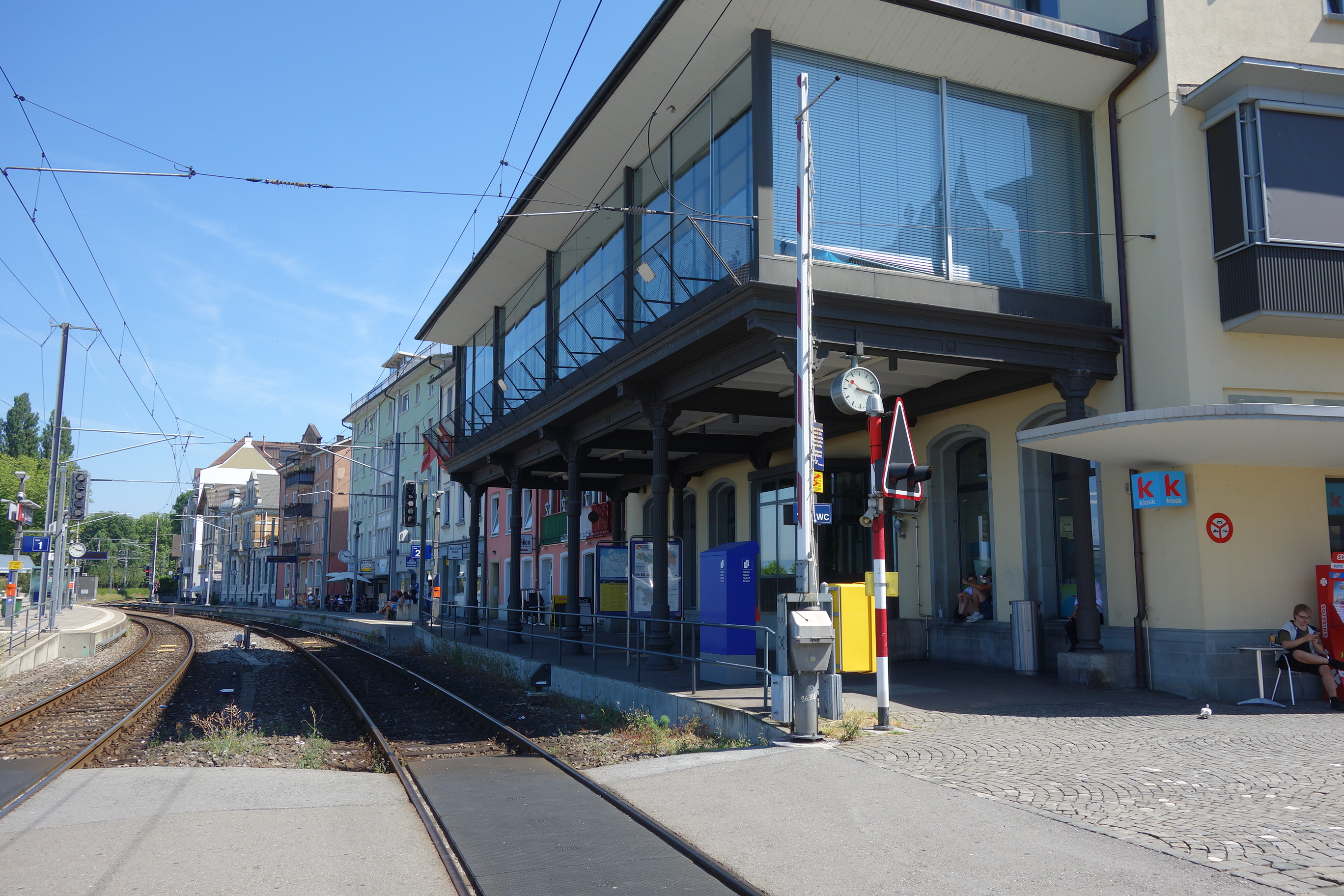 Bahnhof Rorschach Hafen SG, Schweiz